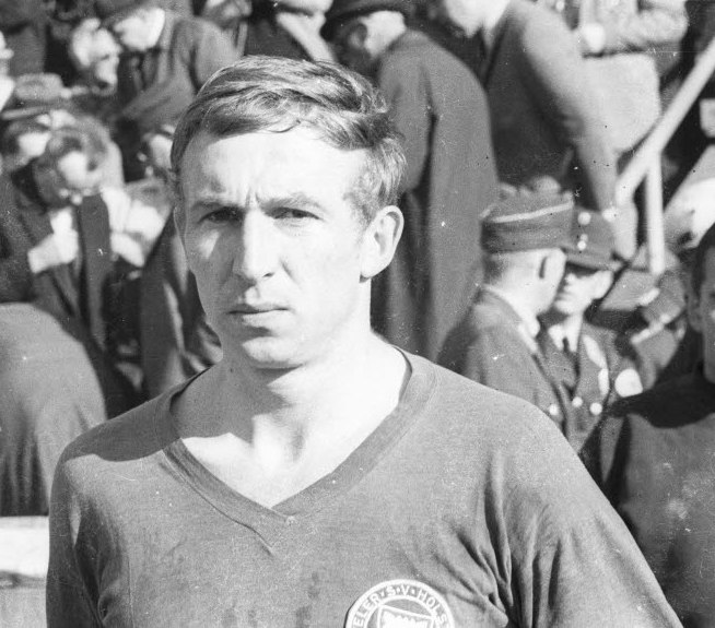 Fußballspieler von Holstein Kiel in der Saison 1966/1967.